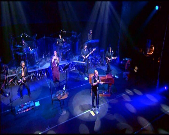 Immagine della band originale di Lucio Dalla